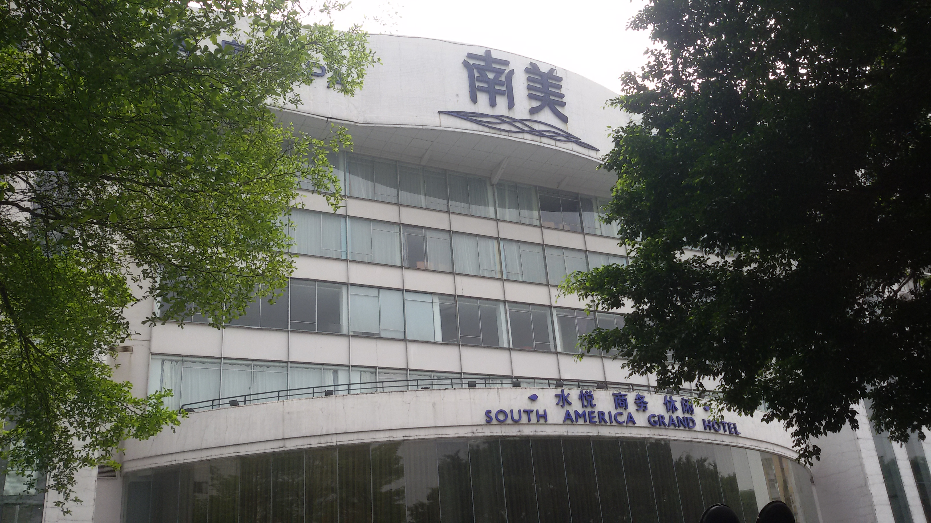 粵語: 南美大酒店